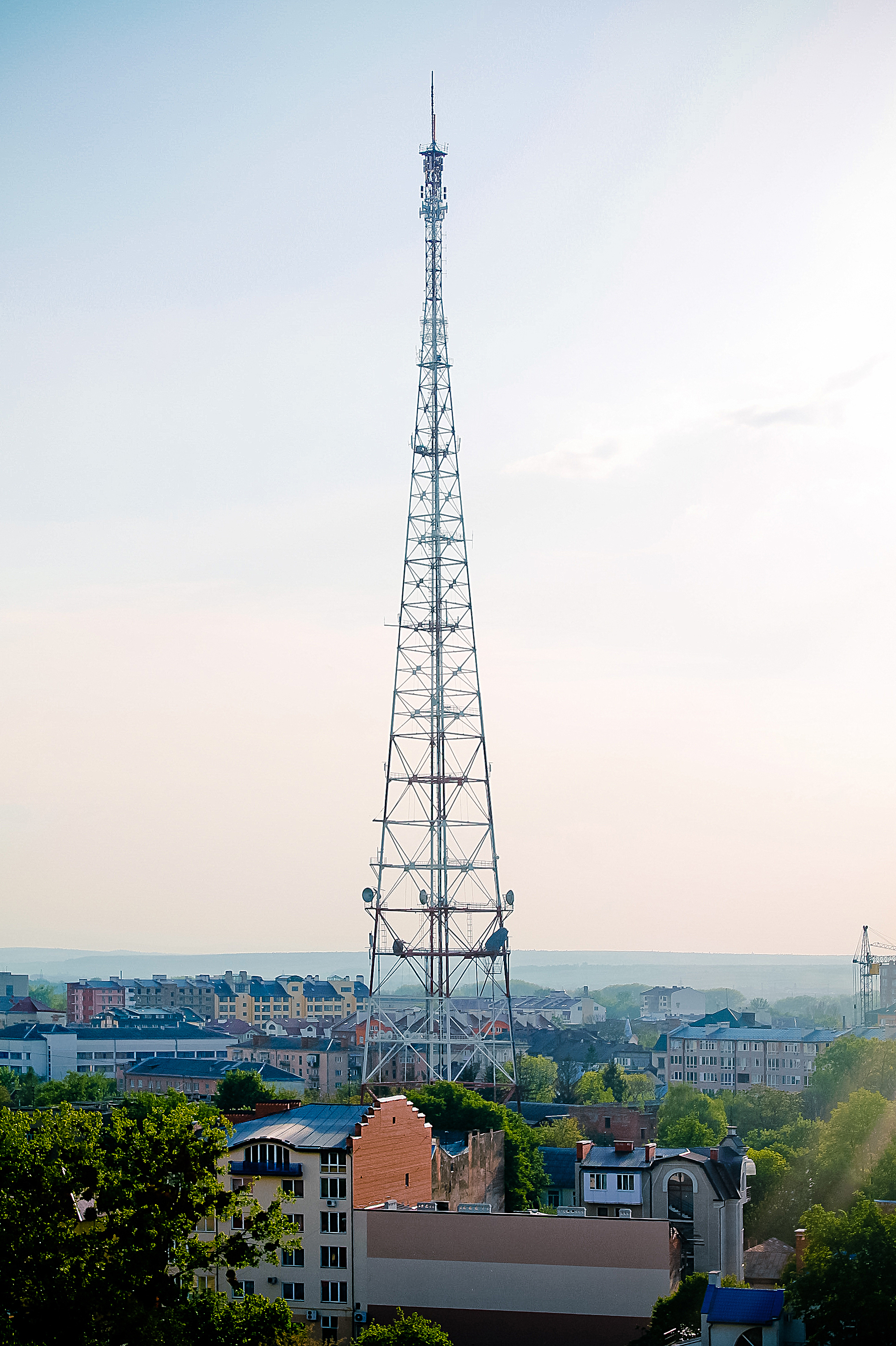 Телевежа